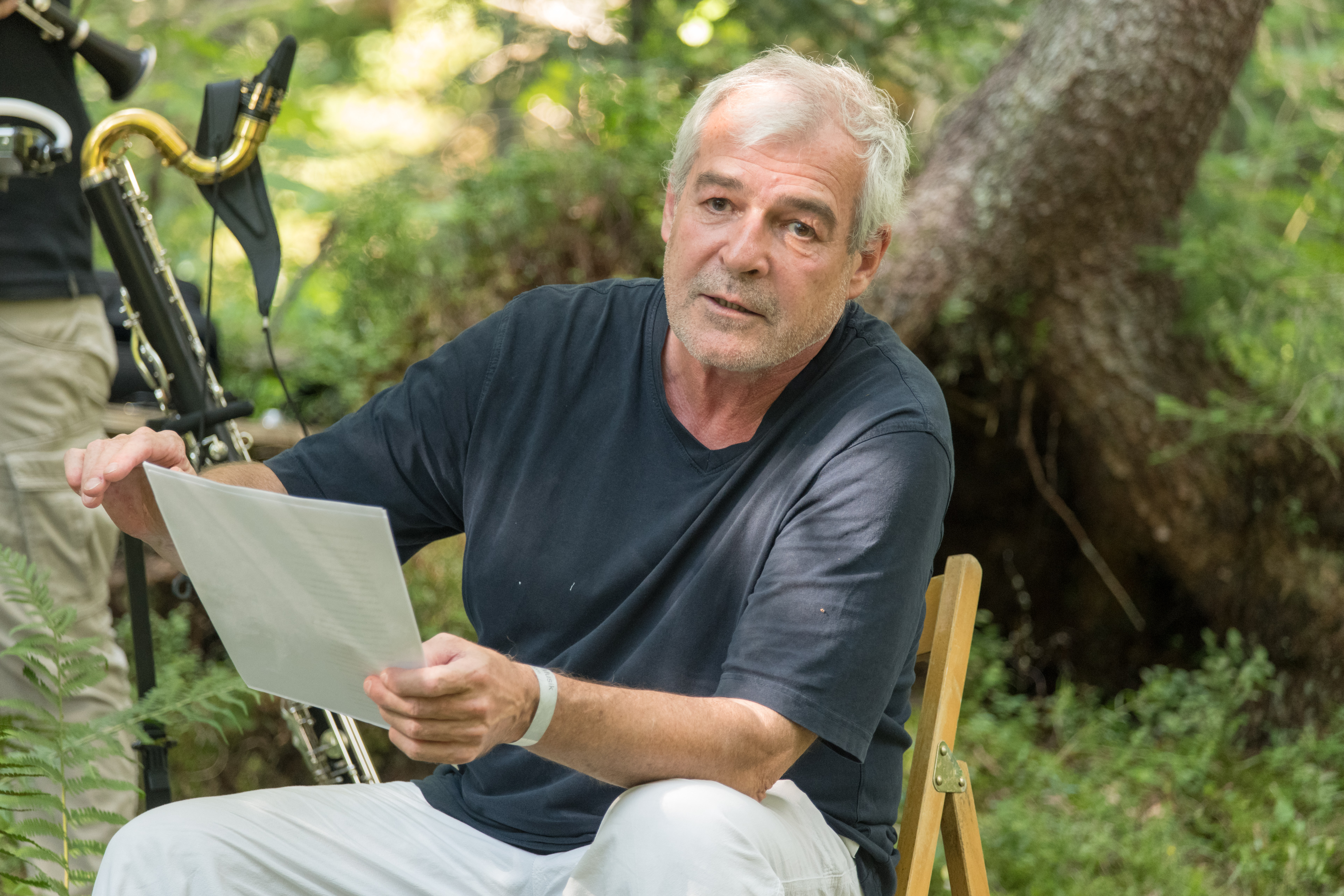 Oliver Karbus bei Sprudel, Sprudel & Musik in Gößl (2018)